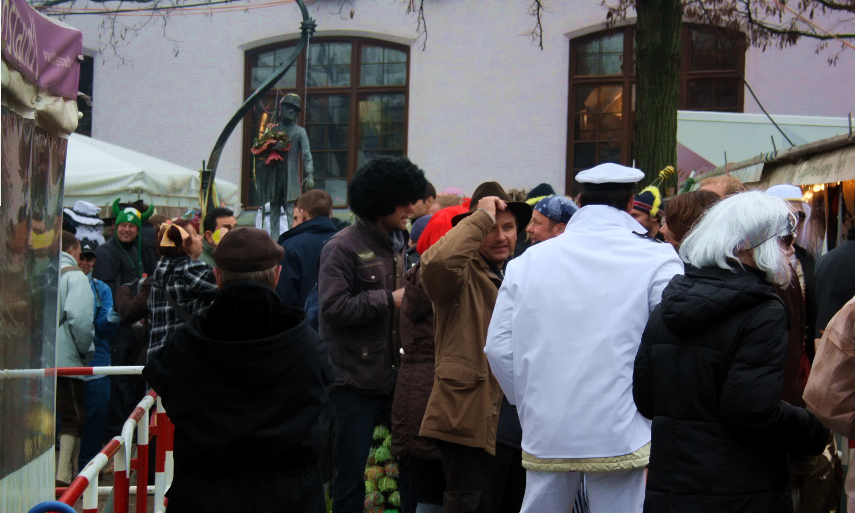 Faschingstreiben am Münchner Viktualienmarkt